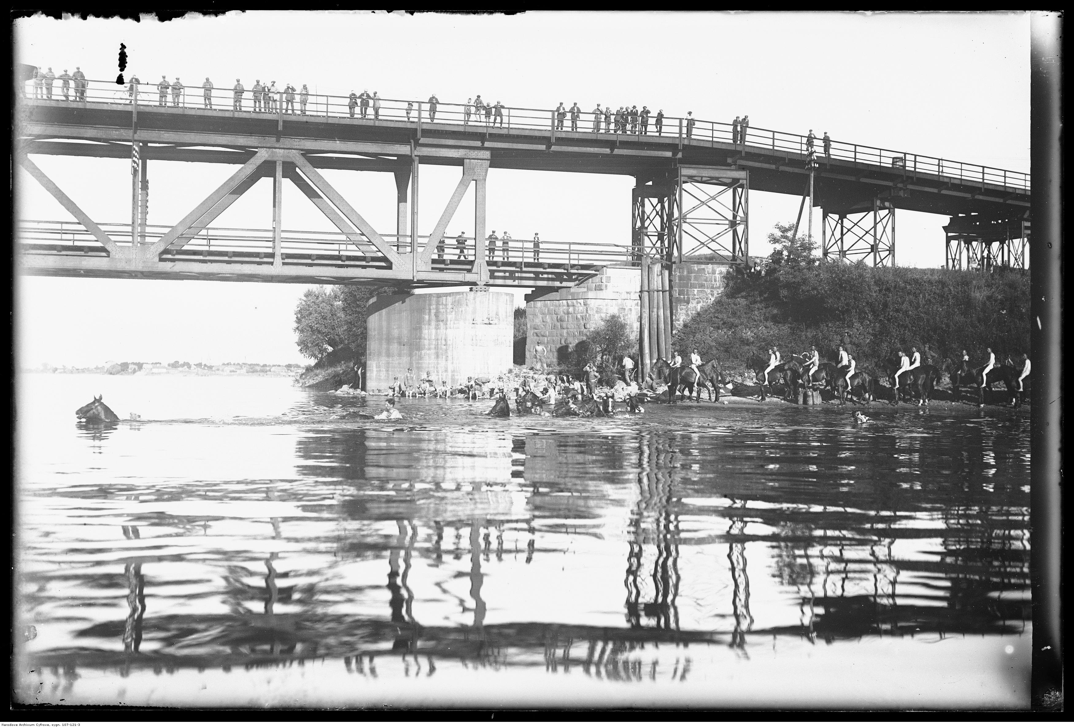 Przeprawa konno przez Narew przy moście.